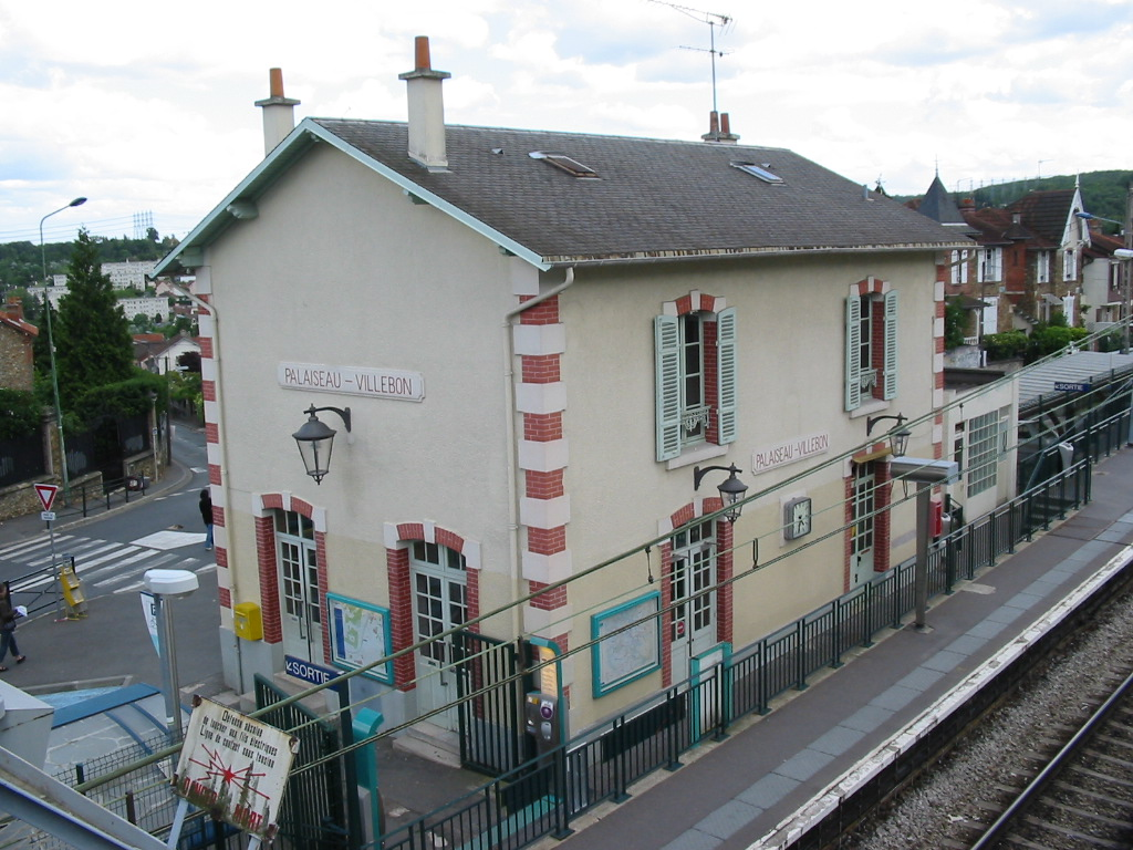 Gare de Palaiseau-Villebon, RER B, France